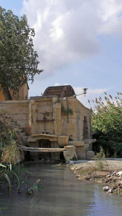 Noria